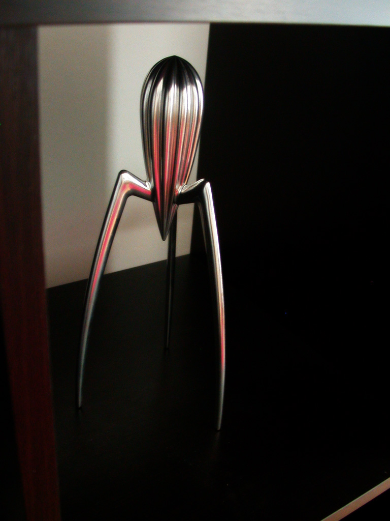 Juicy Salif lemon squeezer, made by Alessi, design Philippe Starck